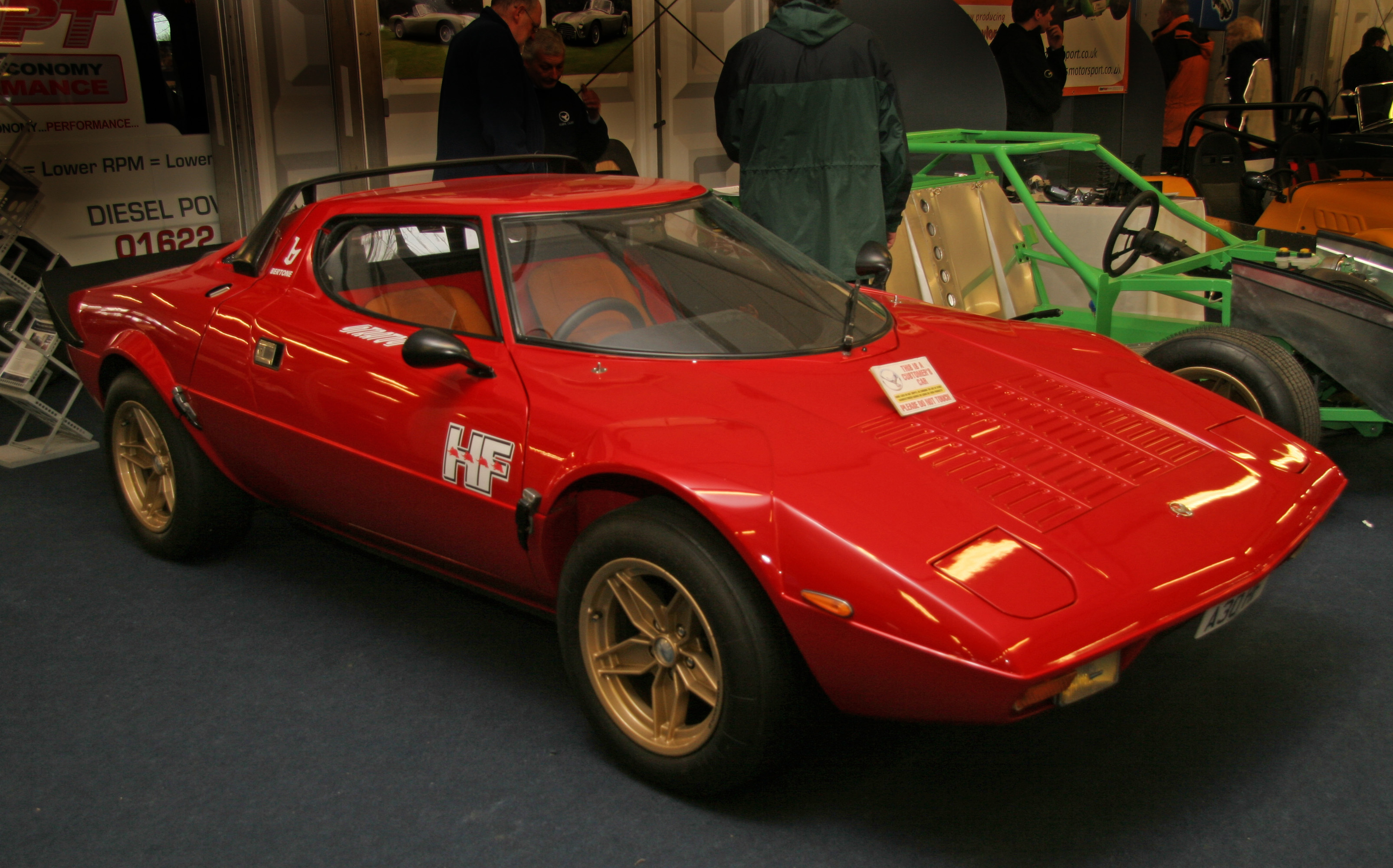 Hawk HF